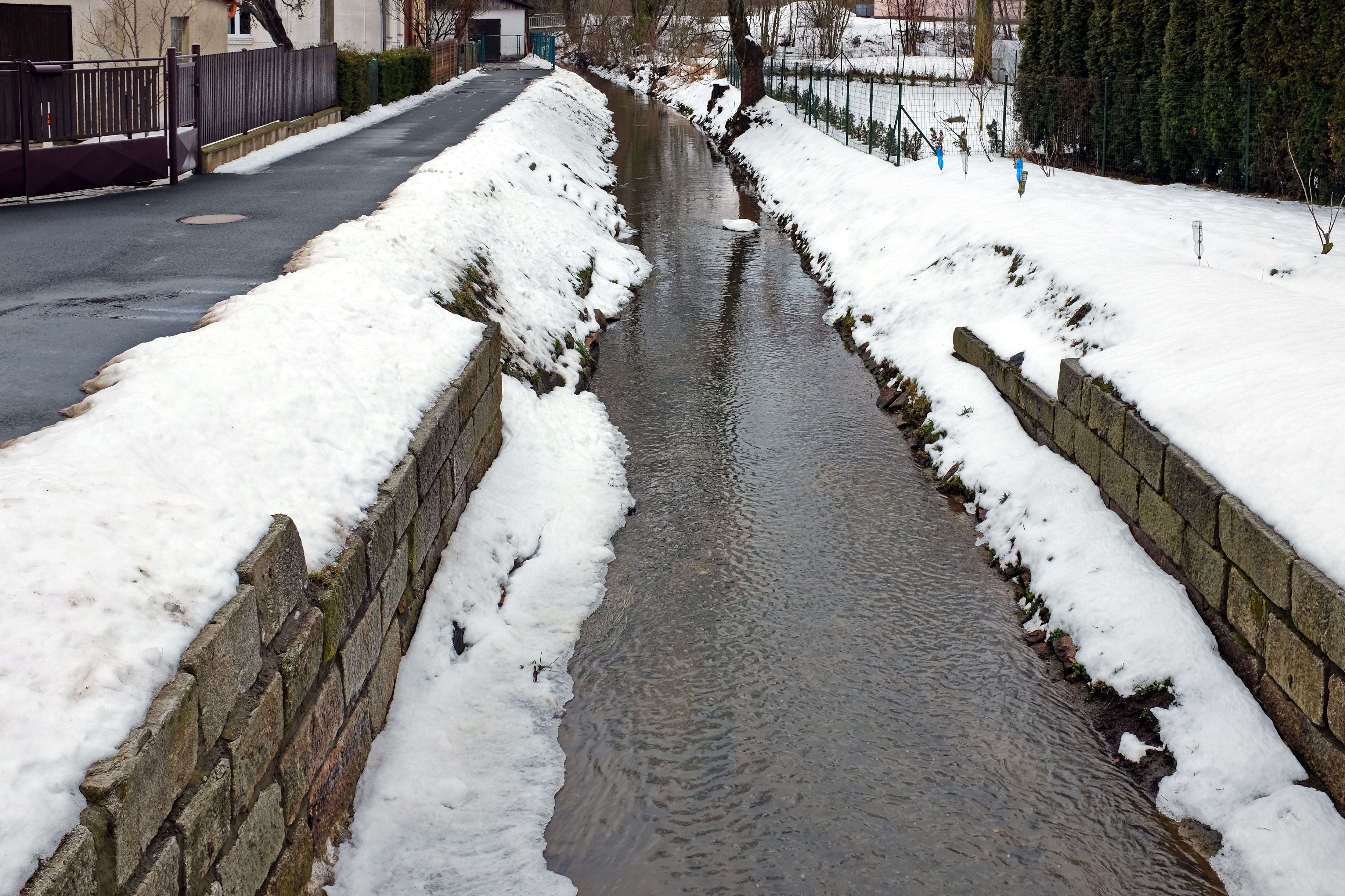 Černý potok, přítok Vlčího potoka, v Božičanech, okres Karlovy Vary